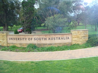 南澳大校園入口